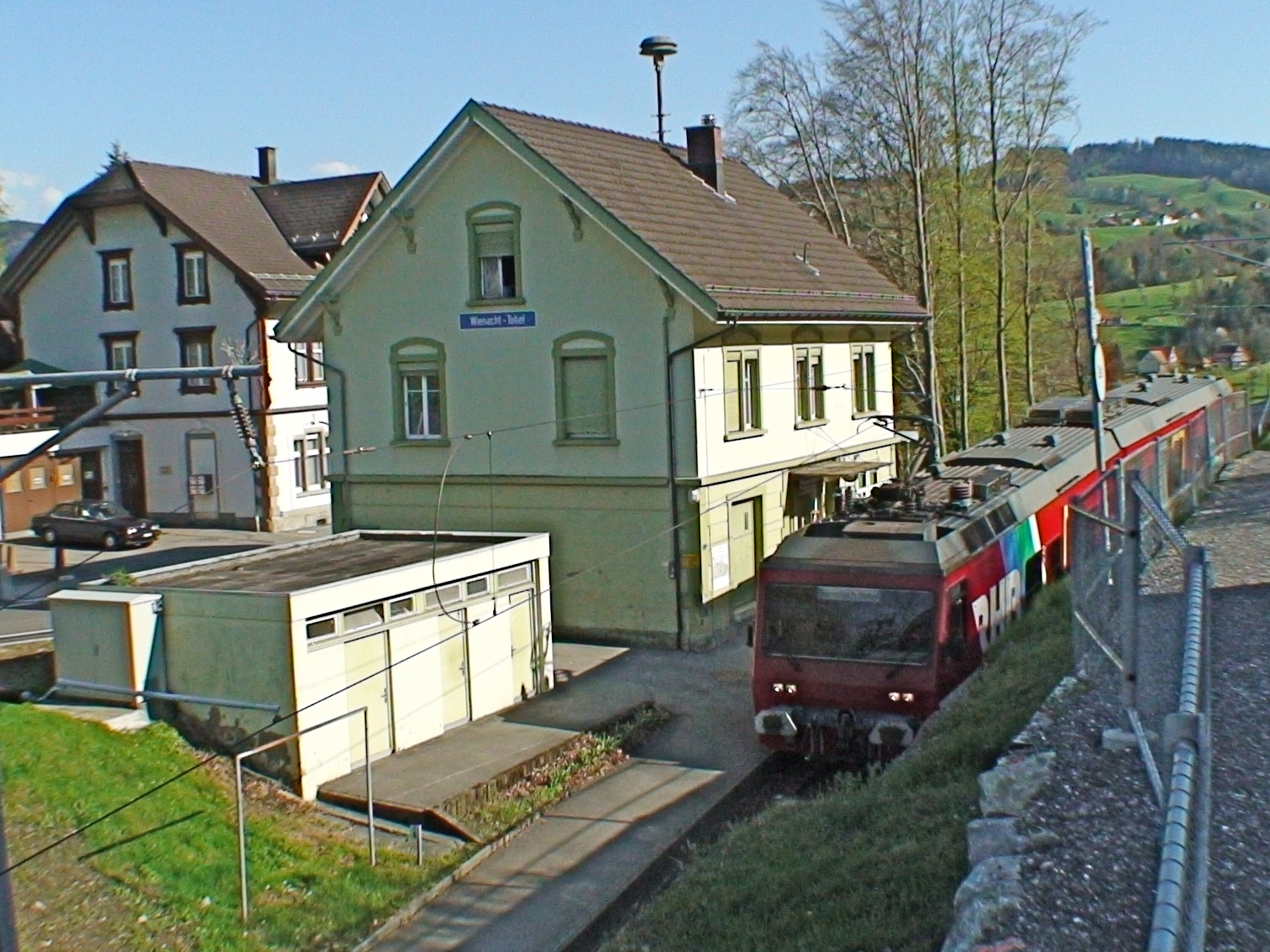 RHB in Wienacht-Tobel, Schweiz